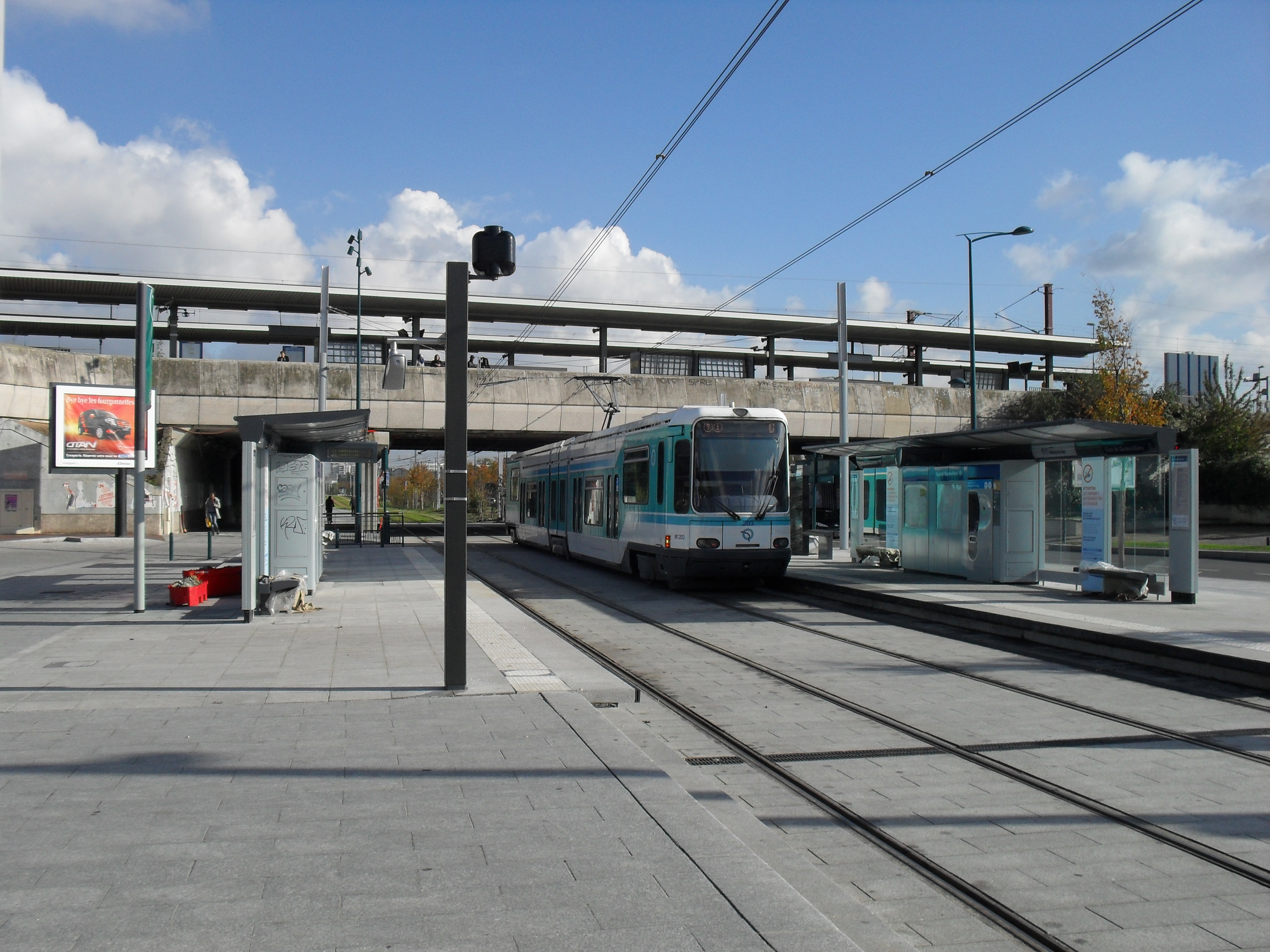 Paris Tramway ligne 1